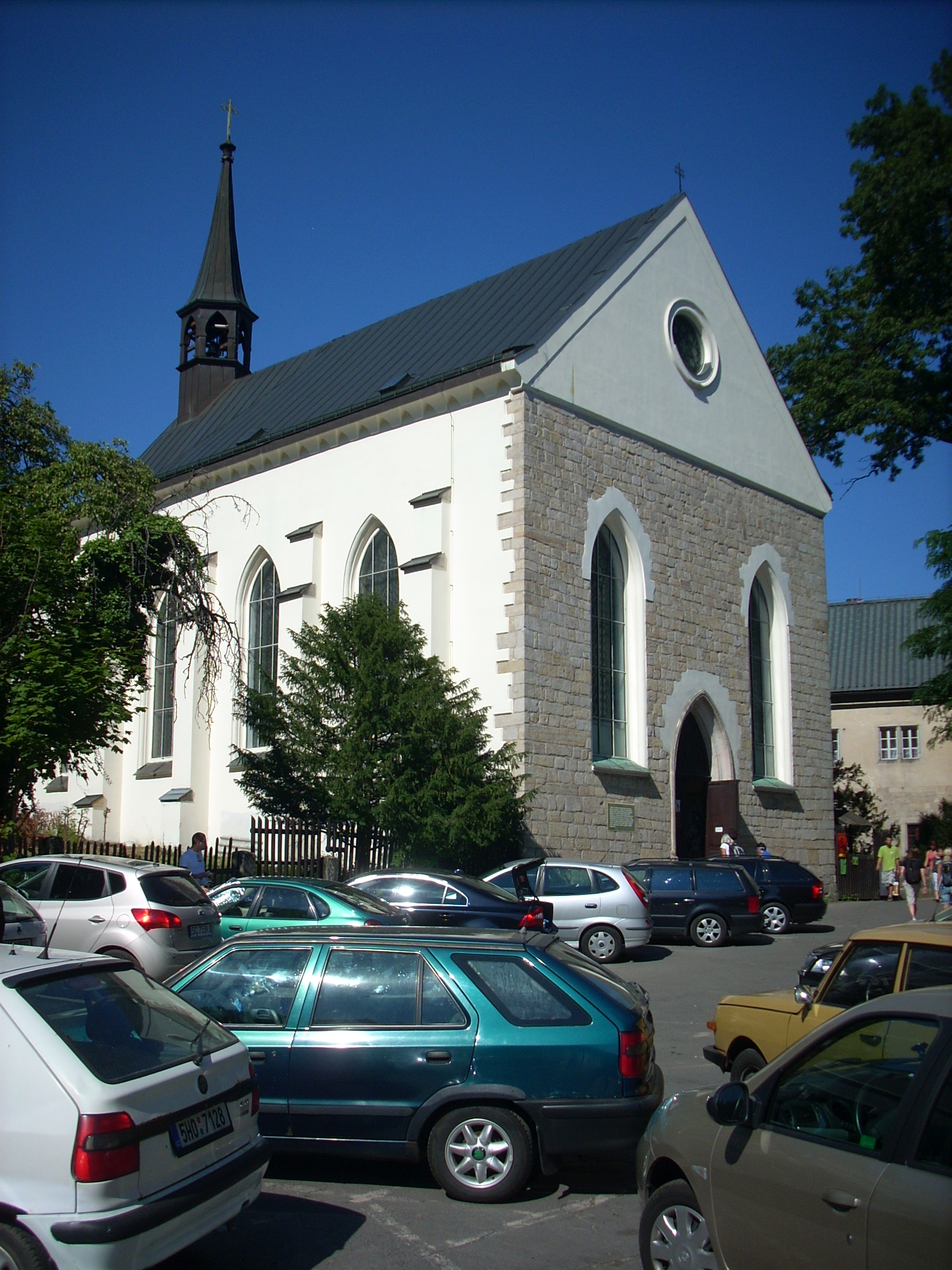 Kostel sv. Josefa (Hrubá Skála), při zámku, Hrubá Skála